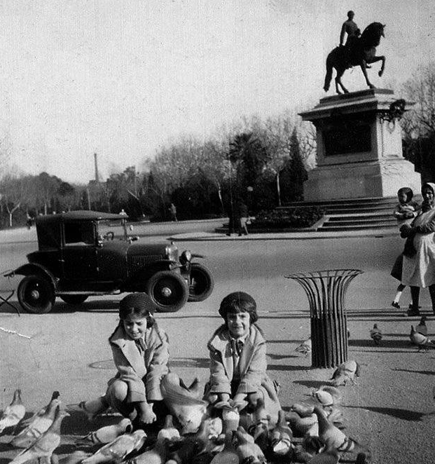 Monumento a Prim, parque de la Ciudadela, Barcelona.